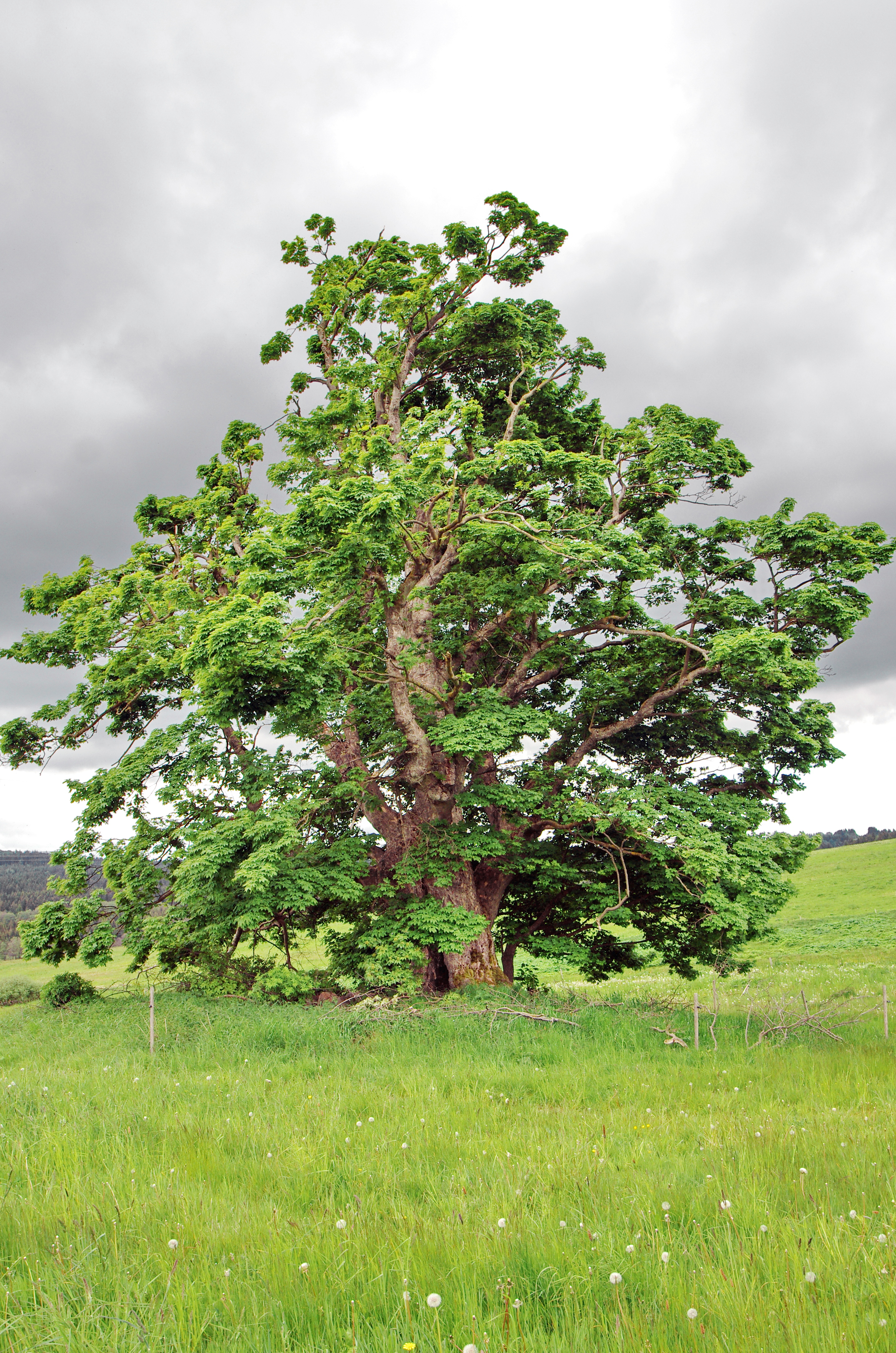 památný strom Rájovský javor, Rájov (Mnichov), okres Cheb